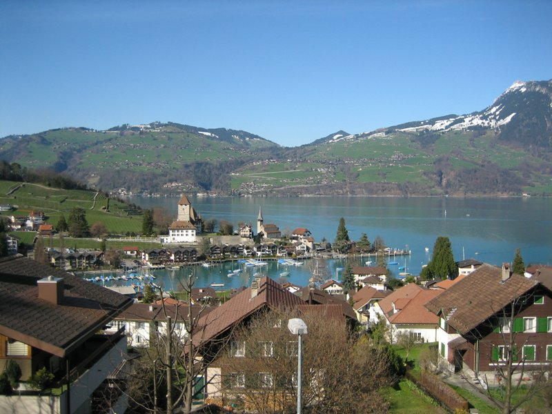 Schloss Spiez in Spiez BE am Thunersee, Schweiz